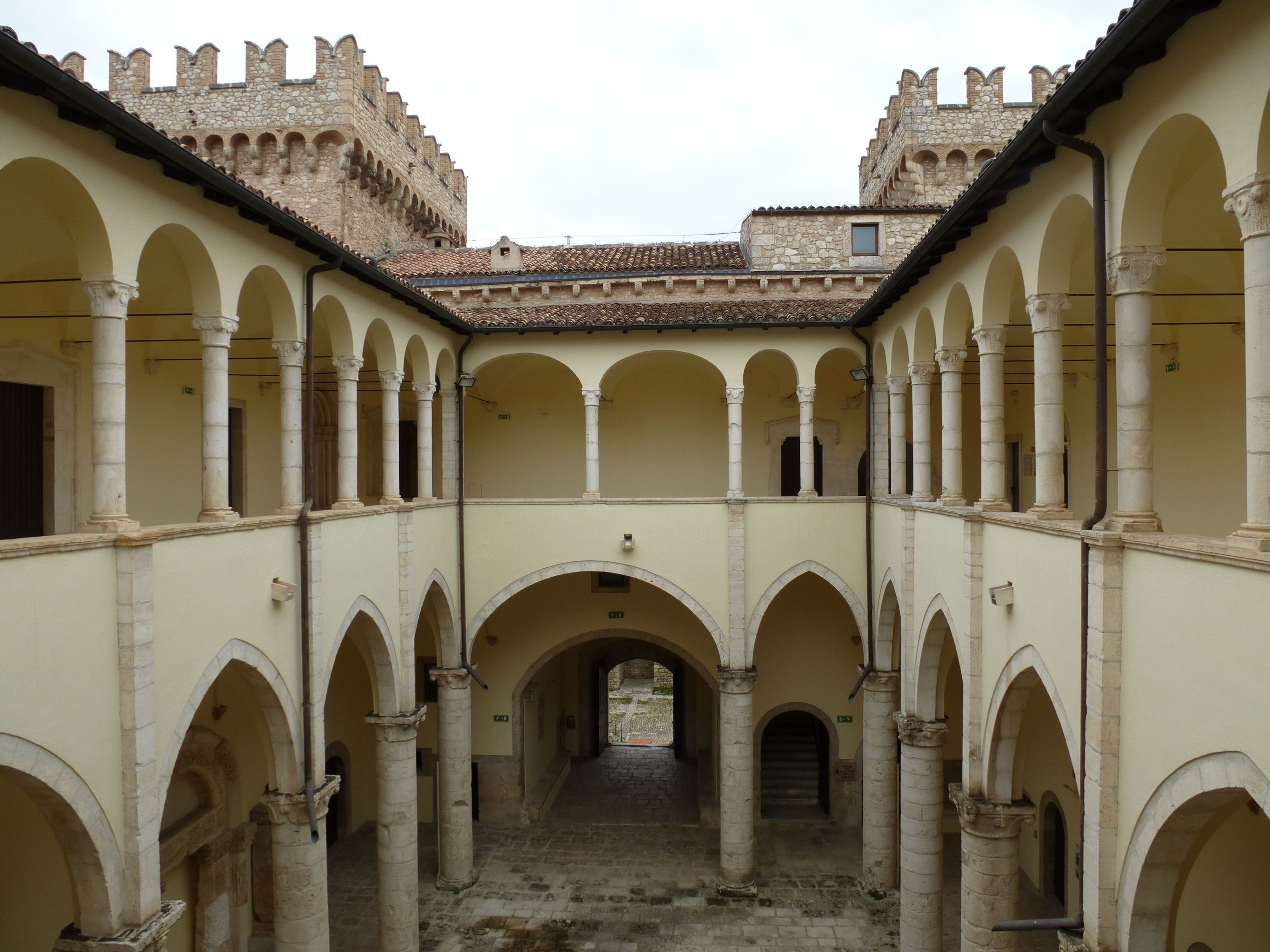 Castello Piccolomini di Celano: Innenhof